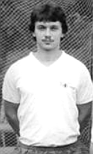 Title: Mannschaftsfoto 1. FC Union Berlin Factual corrections and alternative descriptions are encouraged separately from the original description. Additionally errors can be reported at this page to inform the Bundesarchiv. Original historic description: ADN-ZB-Mittelstädt-23.8.83-zin-Berlin: Die Mannschaft des 1. FC Union Berlin für die Fußball-Oberligasaison 1983-84. Vorn v.l.n.r.: Peter Riedtke, Torhüter Björn Dahms, Torhüter Wolfgang Gehrke und Bernd Quade. Mitte v.l.n.r.: Olaf Seier, Olaf Reinhold, Peter Wirth, Reiner Thomas und Ingo Kimmritz. Hinten v.l.n.r.: Henry Treppschuh, Mannschaftskapitän Lutz Möckel, Lutz Hovest, Holger Sattler, Heiko Lahn, Uwe Borchardt und Lutz Hendel.